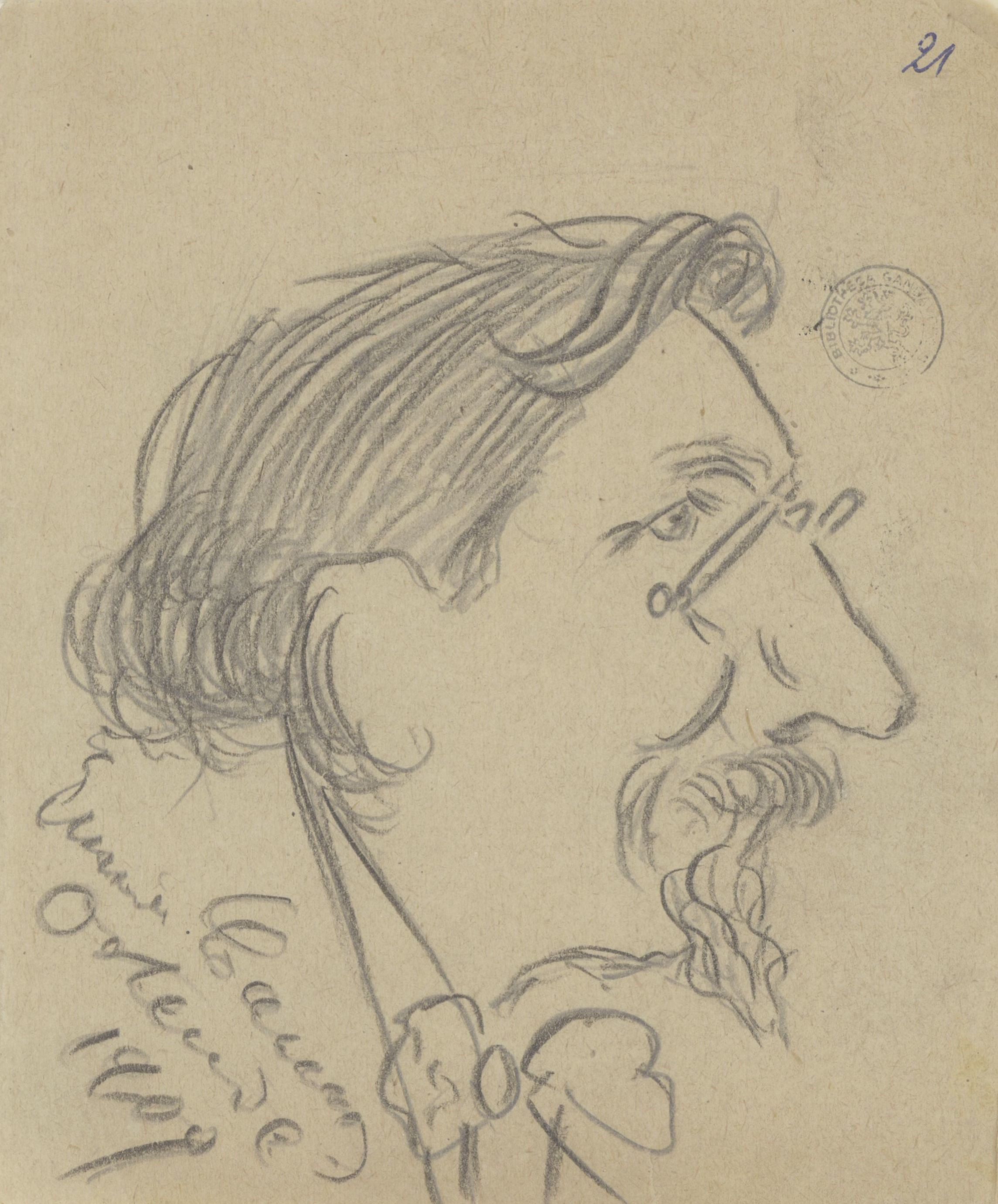 Portret van Jan_Blockx uit verzamelband karikaturen getekend door Enrico Caruso (1906 & 1909, Universiteitsbibliotheek Gent)